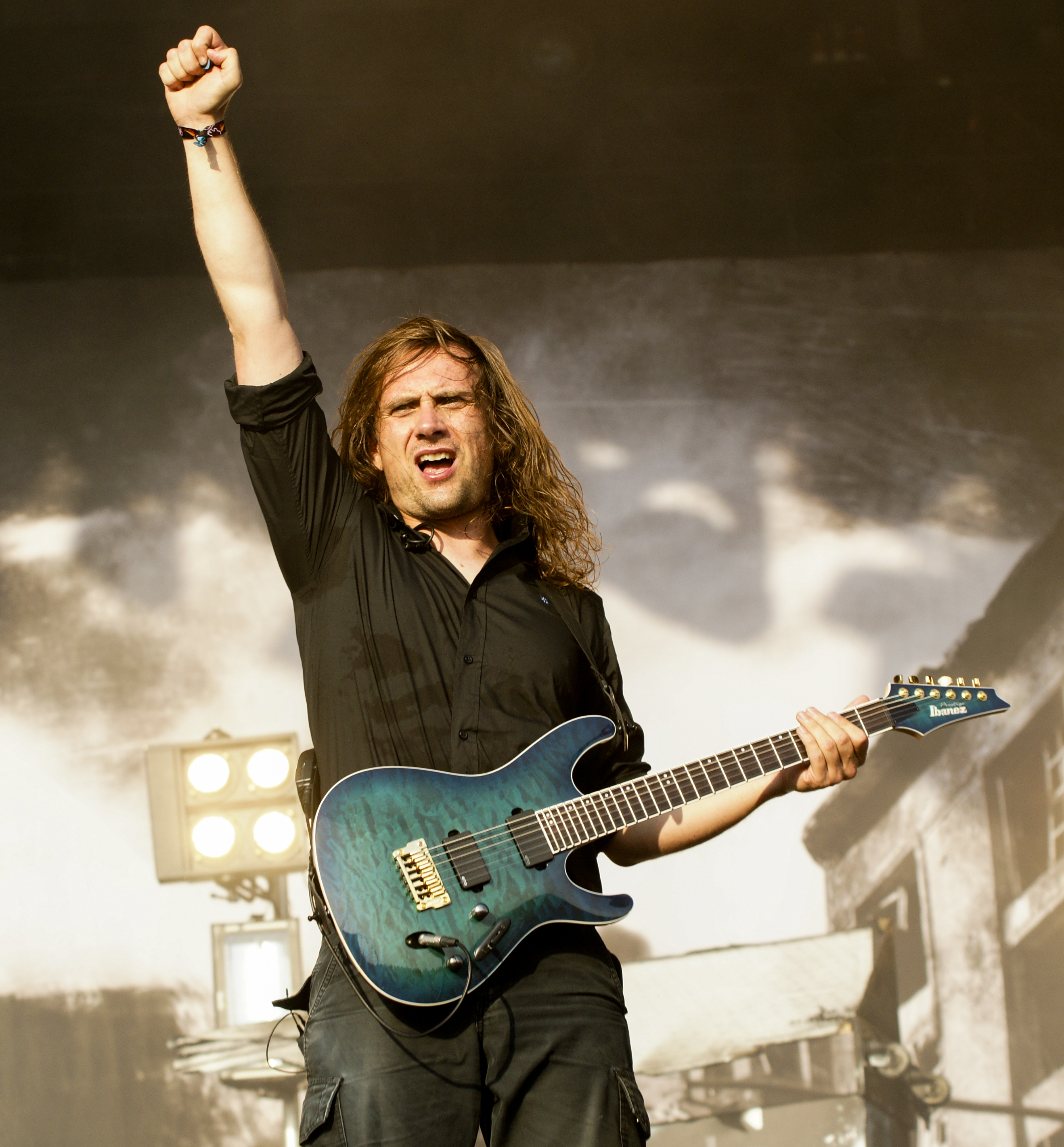 Deichbrand-Festival Seeflughafen Nordholz/ Cuxhaven Heaven Shall Burn auf der Fire-Stage